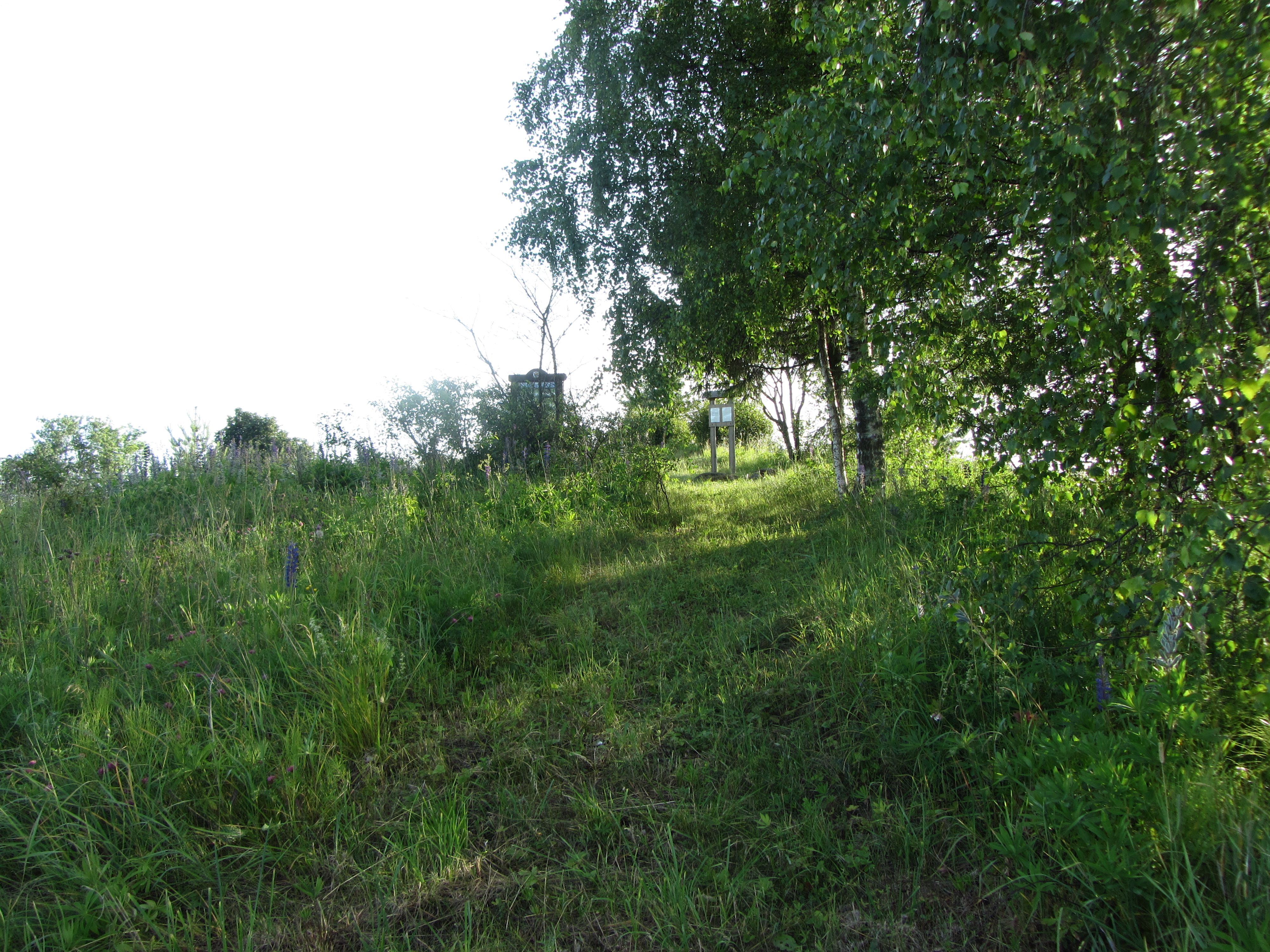 Ceikinių sen., Lithuania